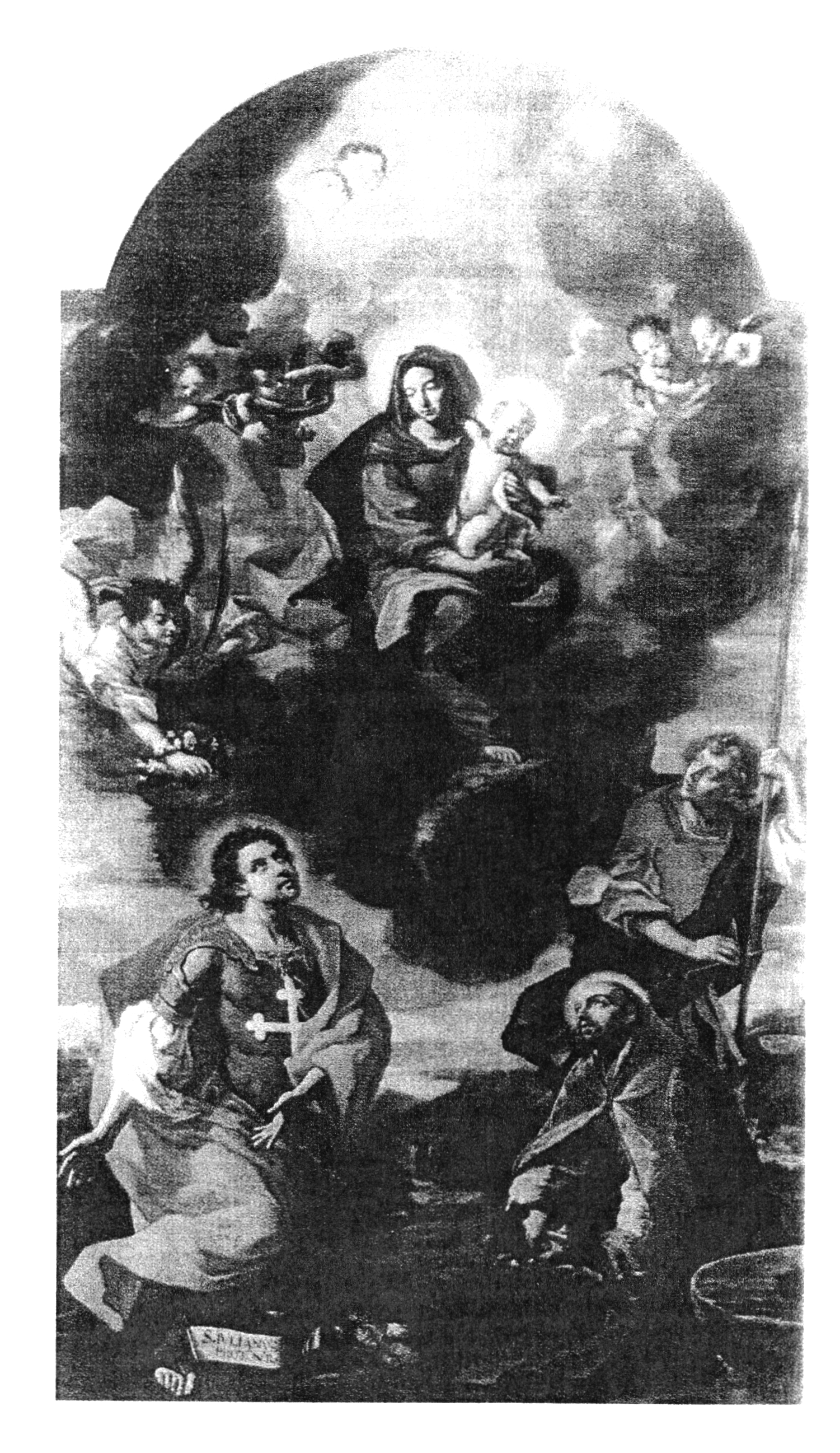 Grande quadro nella chiesa di Barbania